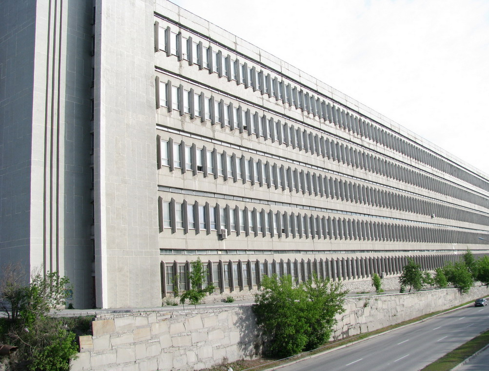 производственная площадка НПО Автоматики в Екатеринбурге